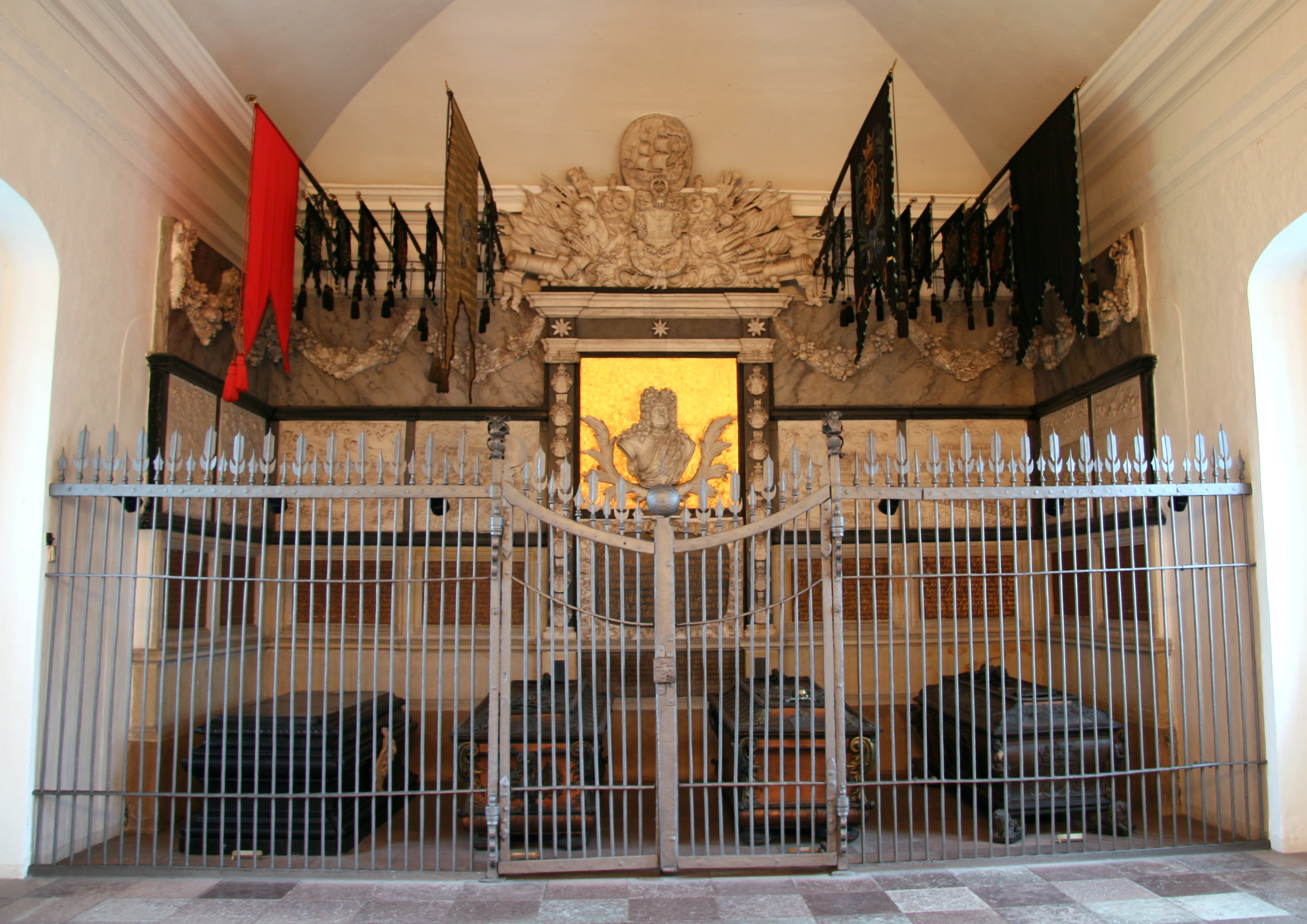 Holmens Kirke, Copenhagen, Denmark . Niels Juels kapel i store kapels sydende.